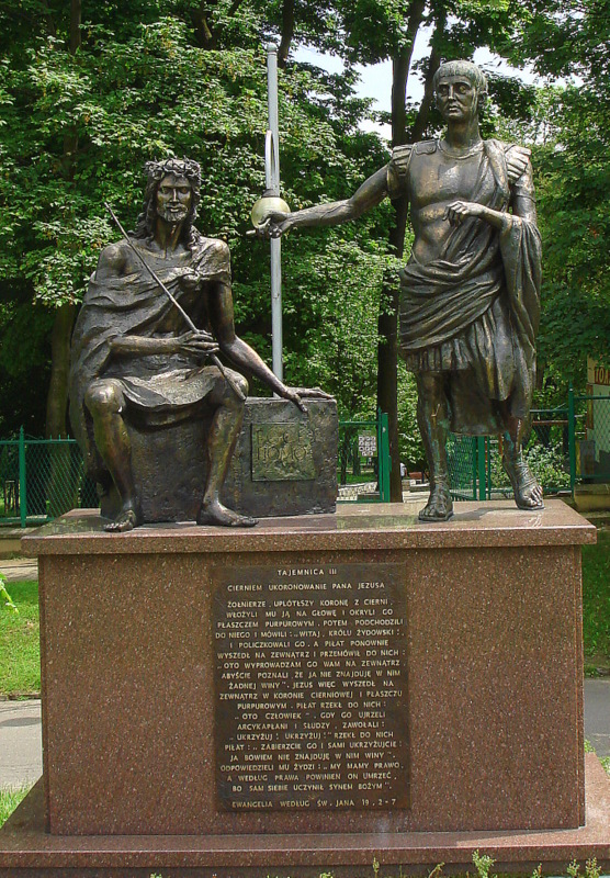 Częstochowa, zespół klasztorny paulinów na Jasnej Górze